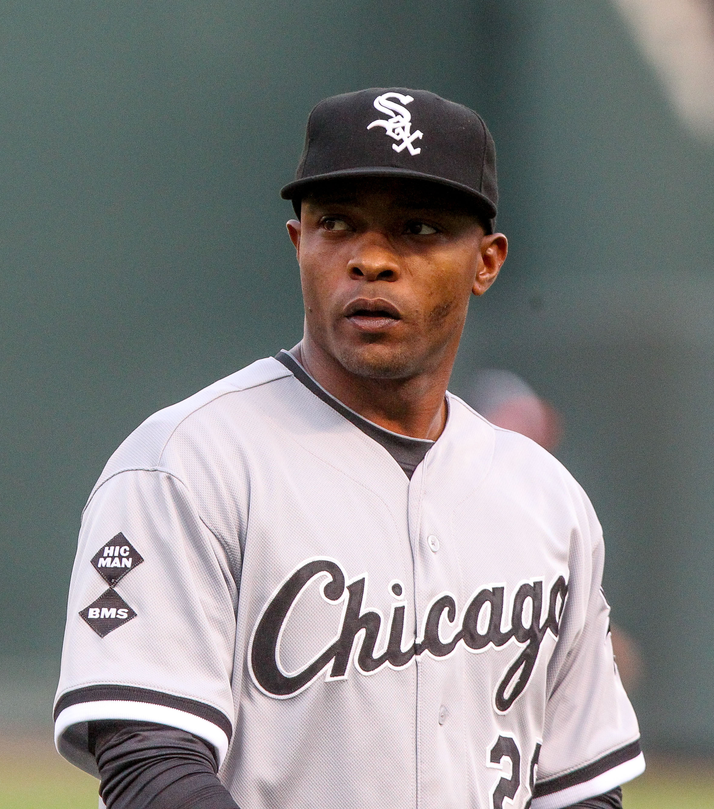 DeWayne Wise